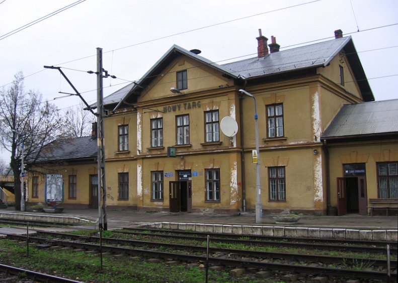 Stacja PKP w Nowym Targu.